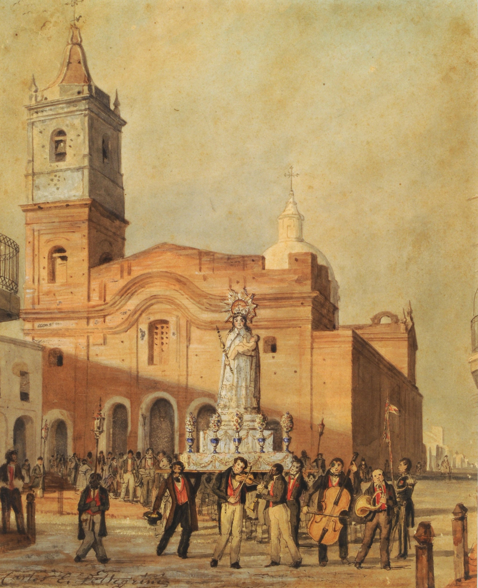 Charles Henri Pellegrini, Iglesia de Santo Domingo (procesión de Nuestra Señora del Rosario, 1830). 1830. 21,5 x 17,5 cm, acuarela sobre papel. Inv. 3135.